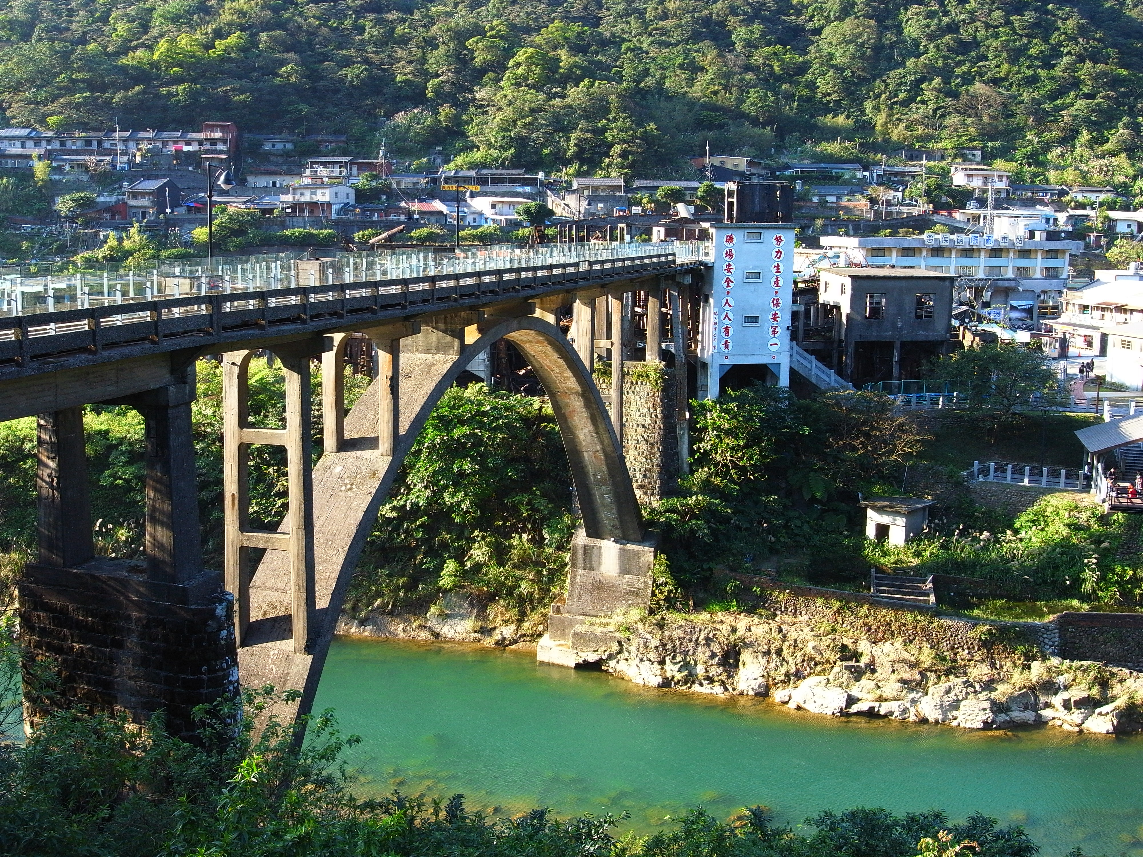 R0015141